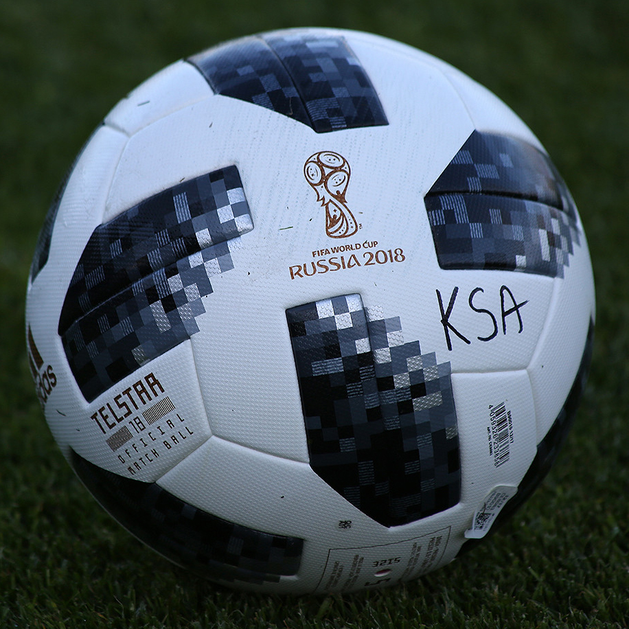 Сборная Саудовской Аравии потренировалась в Петербурге